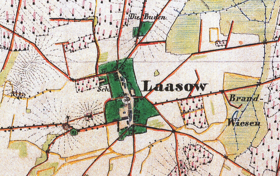 Laasow, Ortsteil der Stadt Vetschau/Spreewald, Landkreis Oberspreewald-Lausitz, Brandenburg, Ausschnitt aus dem Urmesstischblatt 4250 Vetschau